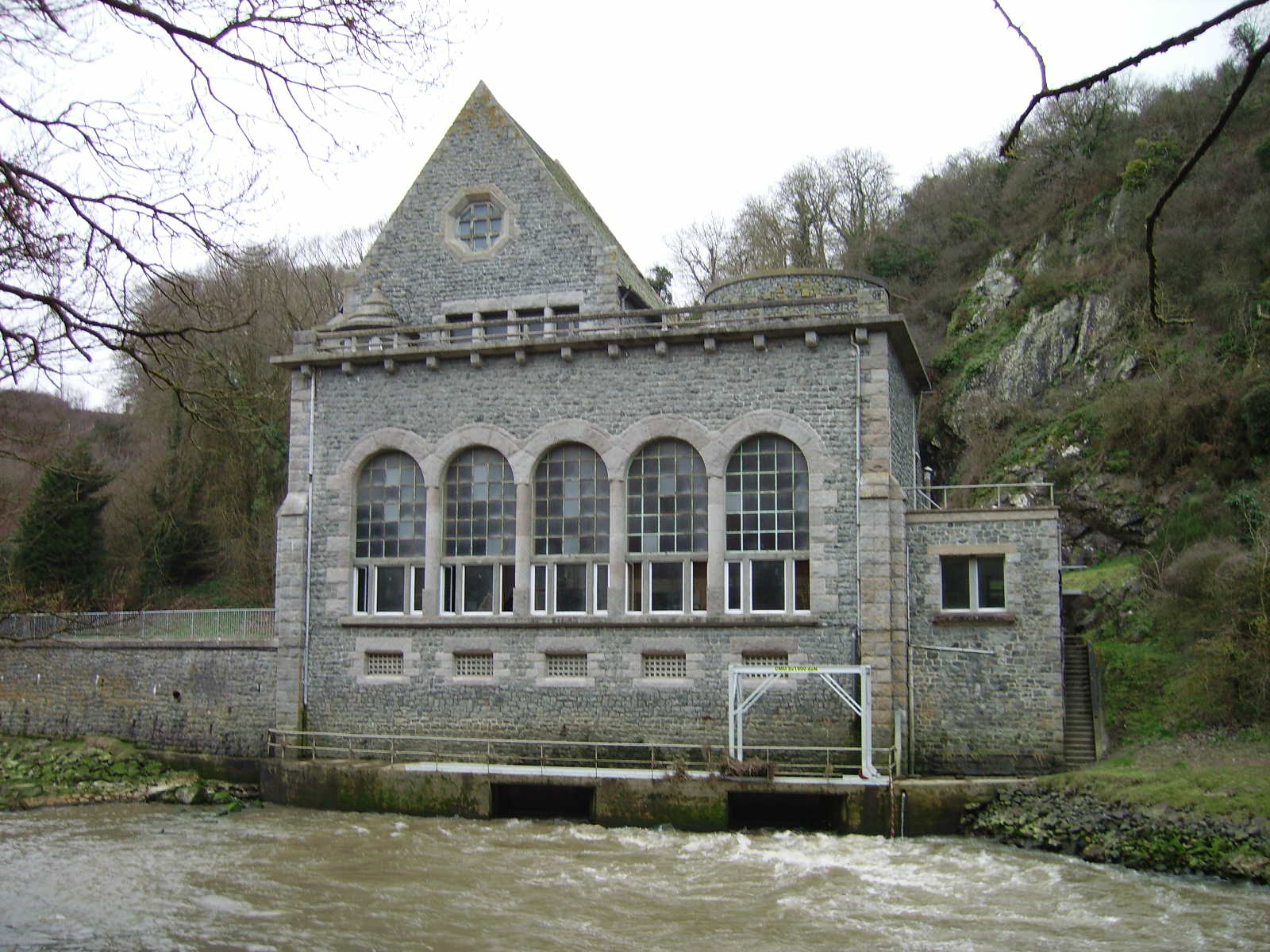 La elektra centralo de Pont Rolland en Hillion en Bretonujo